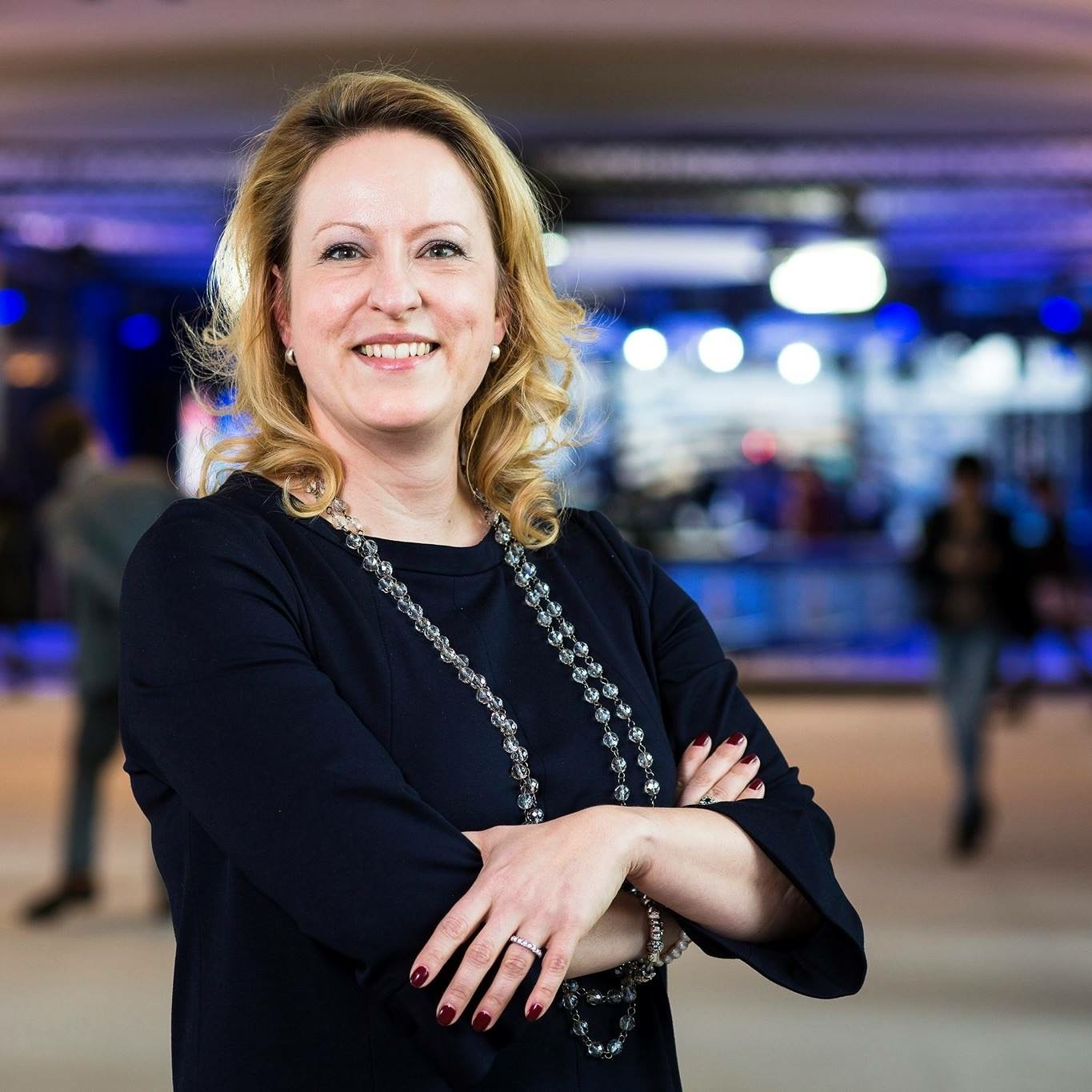 Foto van Esther de Lange MEP